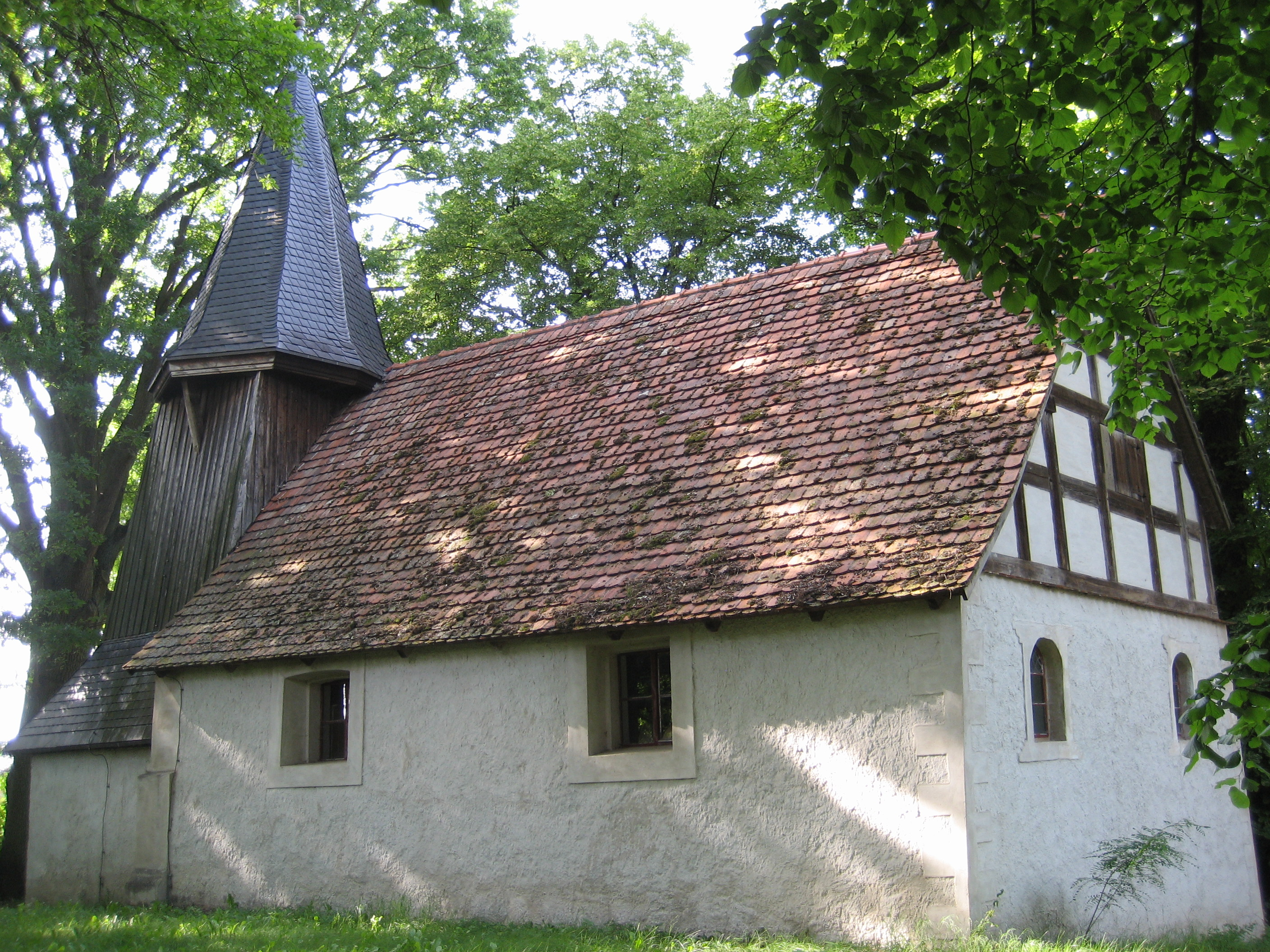 Kirche Wetzenow aus Blickrichtung Südosten.